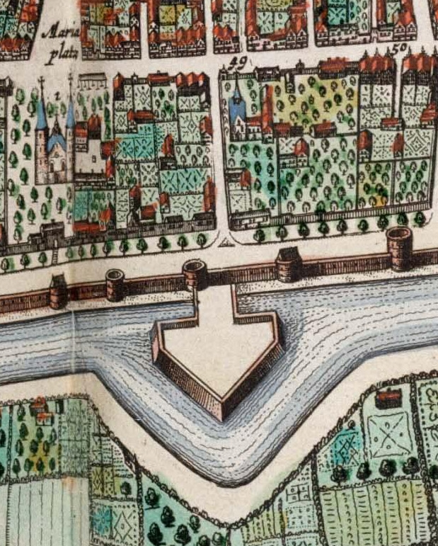 Uitsnede uit stadsplattegrond van Utrecht met voormalige Mariabolwerk in 1649. Oost ligt boven in dit kaartdeel.